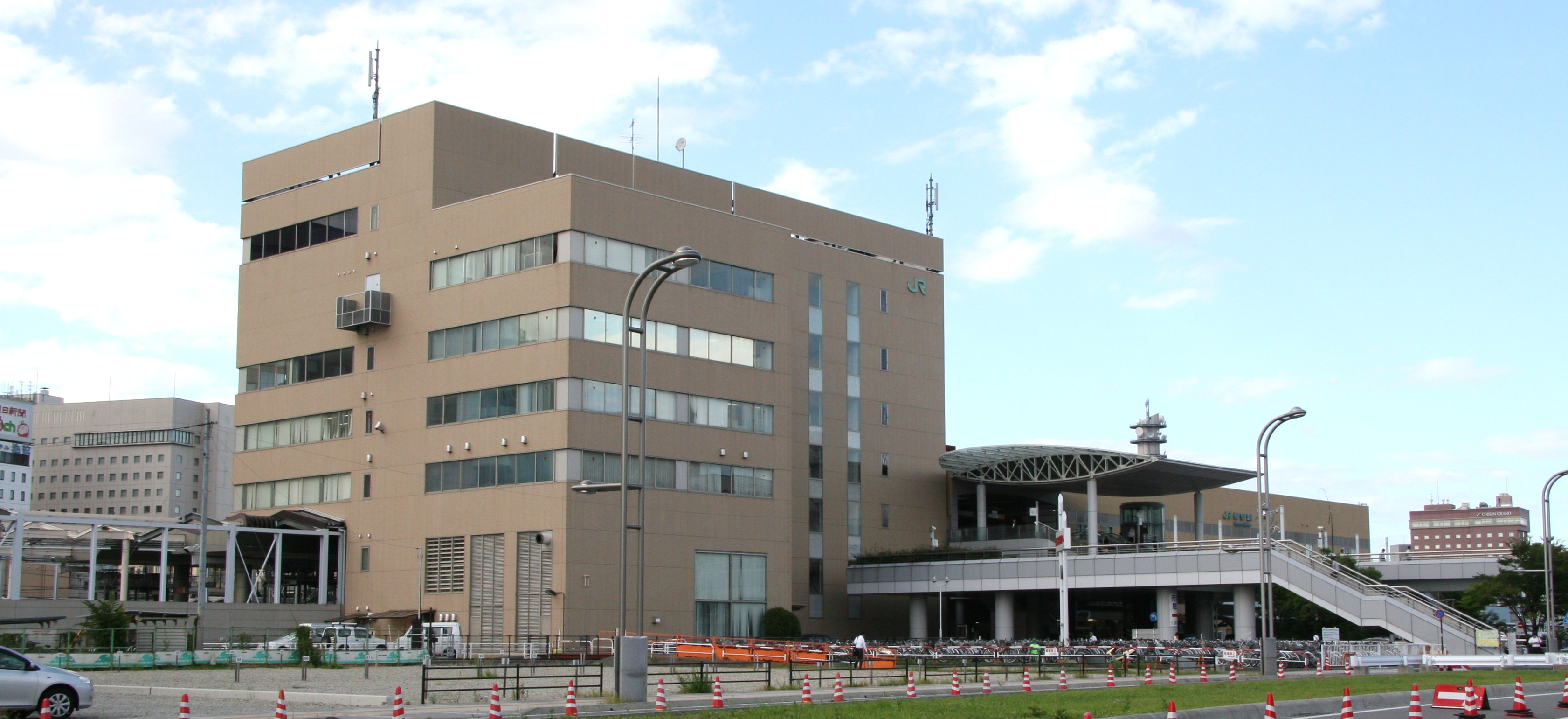 Nagano Station